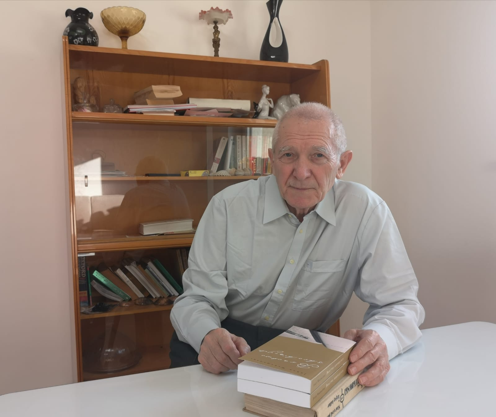 zdjęcie przedstawia Jerzego Waksmańskiego z egzemplarzami "Bractwa Skrobiących"